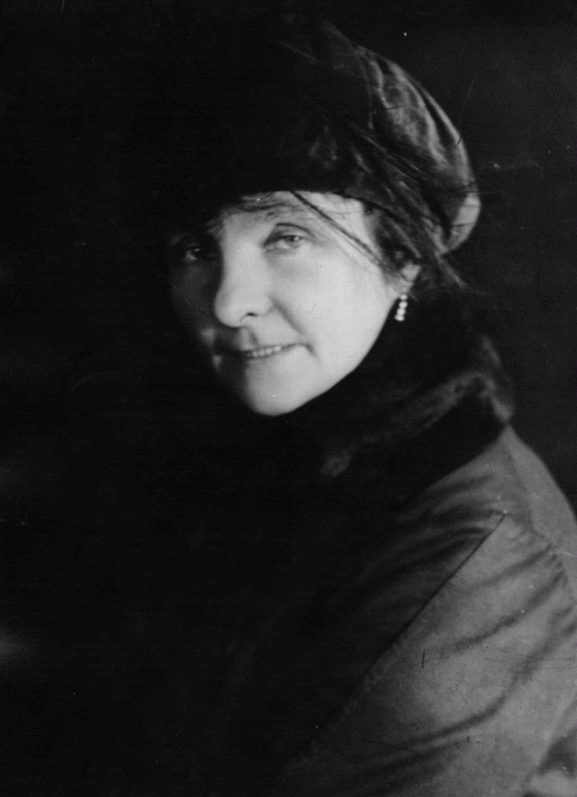 Anna Maria Tilschová (1873 - 1957), Česká spisovatelka-prozaička.